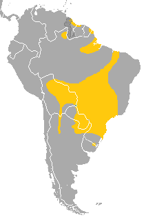 Distribución del Ramphastos toco